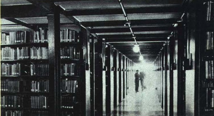 1964-06 1964年 北京市图书馆